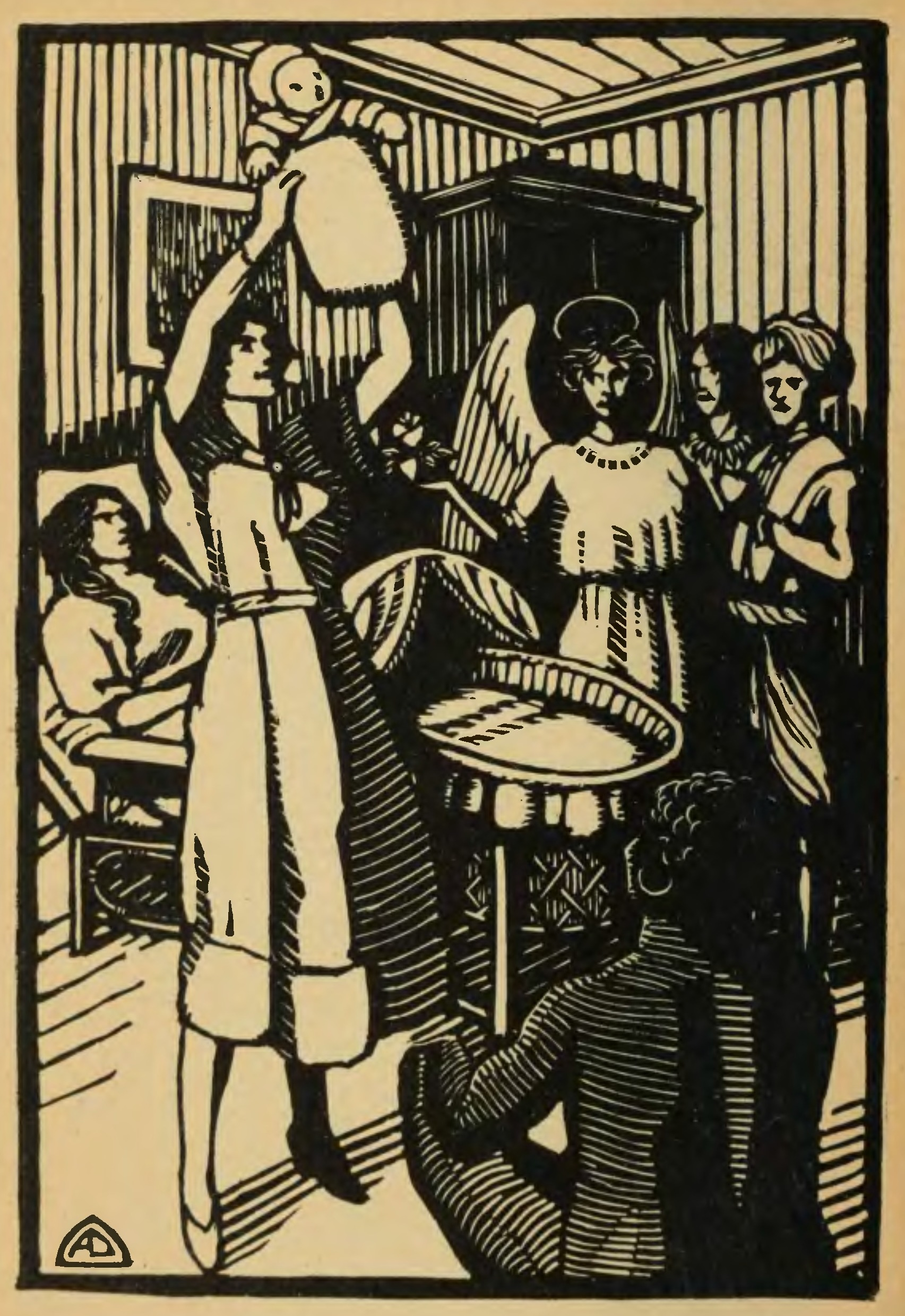 La Rose à Marie